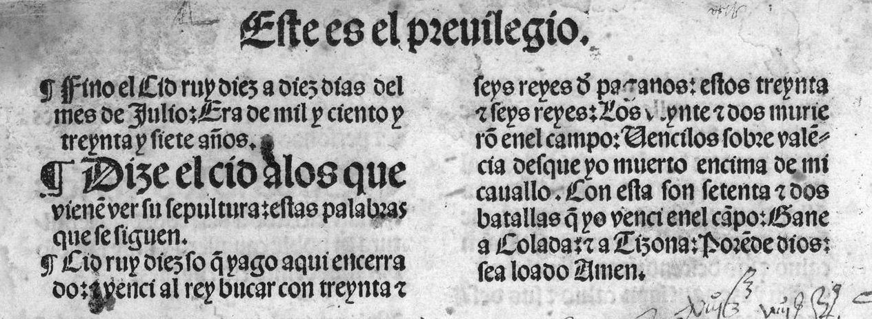 Texto del Epitafio épico del Cid (c. 1400) en un detalle de la parte superior del folio 115v de la Crónica del famoso caballero Cid Ruy Díez Campeador, Burgos, Fadrique Alemán de Basilea; abad Juan López de Belorado y monjes del monasterio de San Pedro de Cardeña, 1512